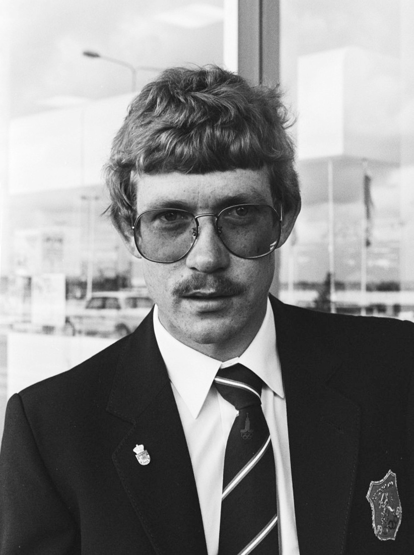 Kees van Ieperen